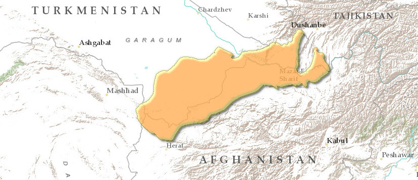 Mappa Ecoregione PA1306 - Semi-deserto di Badkhyz e Karabil